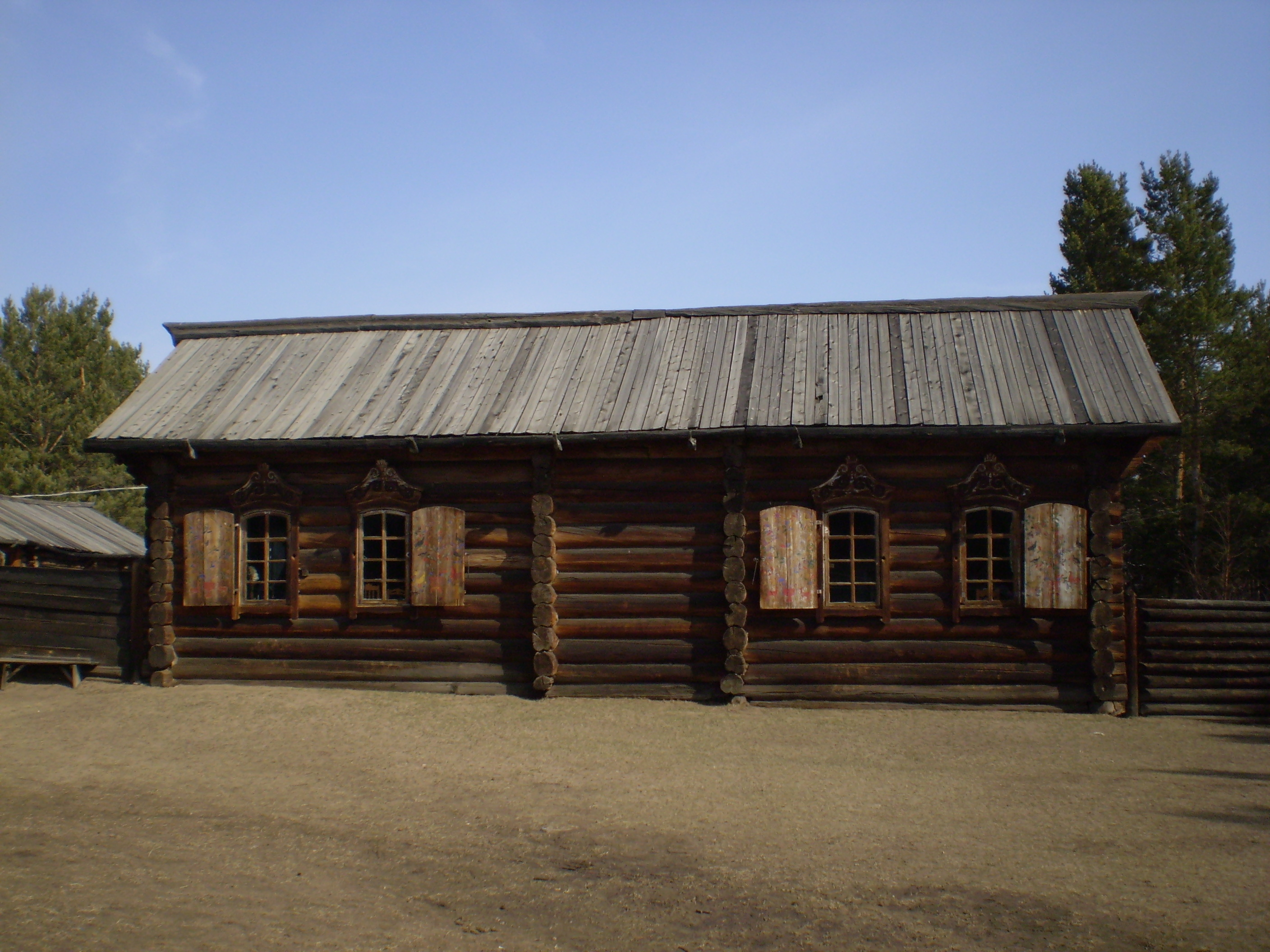 Старообрядческий дом